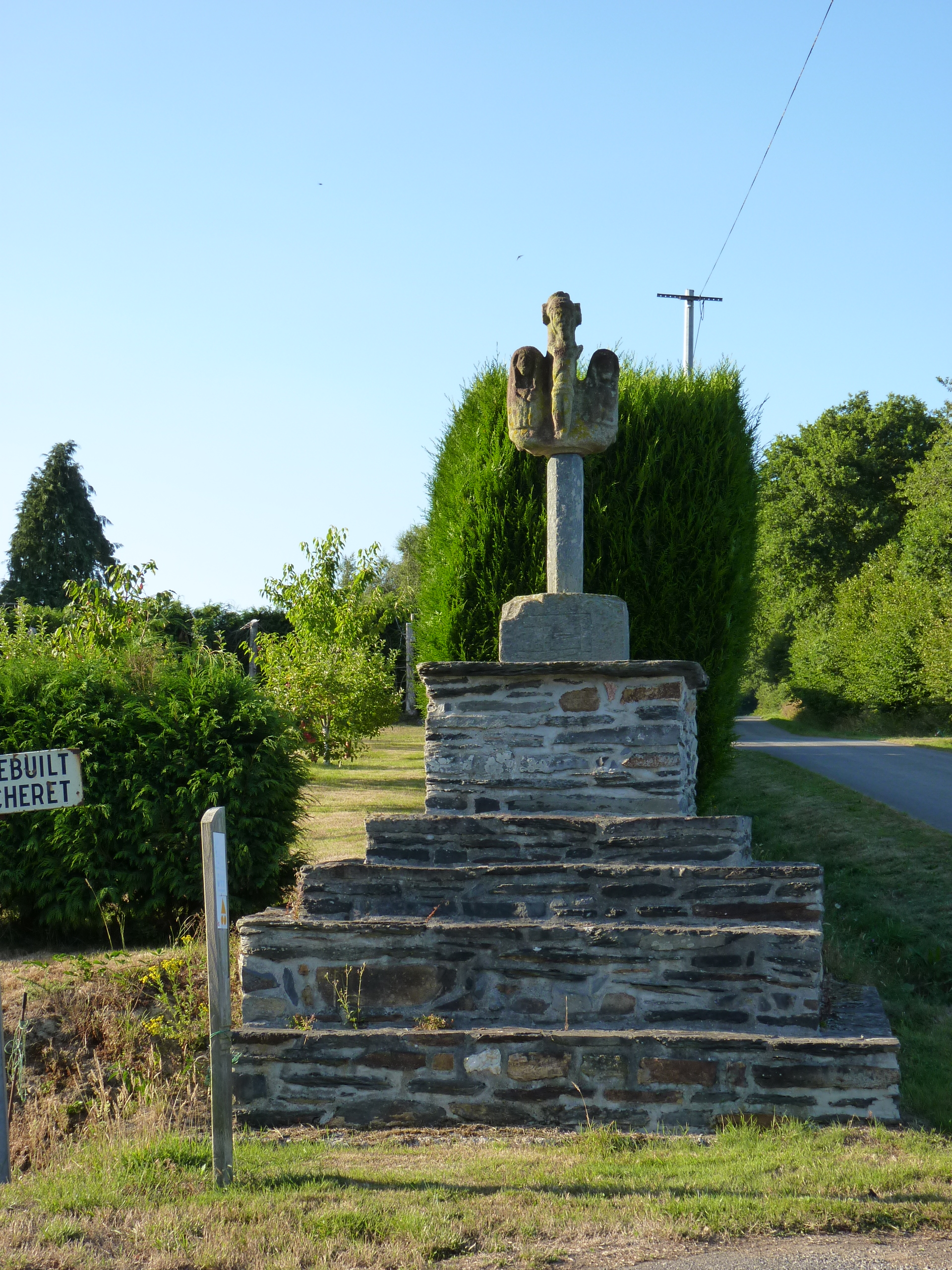 Croix du 17ème siècle.